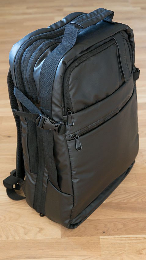 Palubní batoh je zavazadlo, které svou velikostí splňuje velikostní podmínky většiny leteckých společností. Je tedy uznávaným palubním zavazadlem.